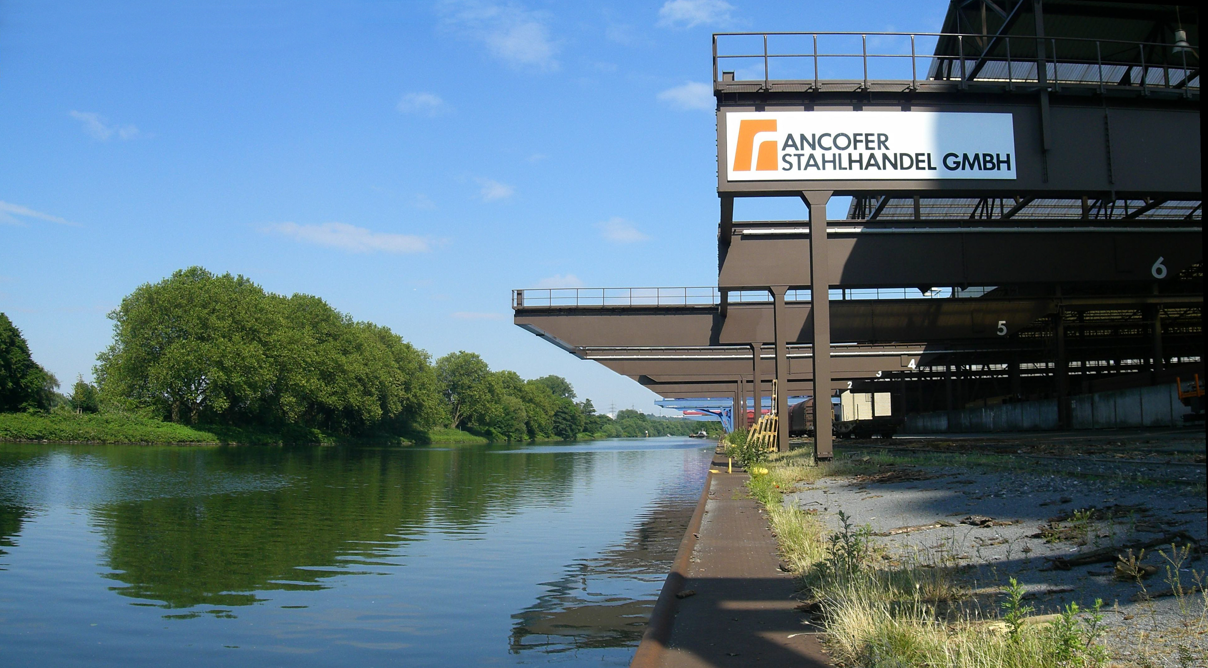 Rhein-Ruhr-Hafen, Nordhafen